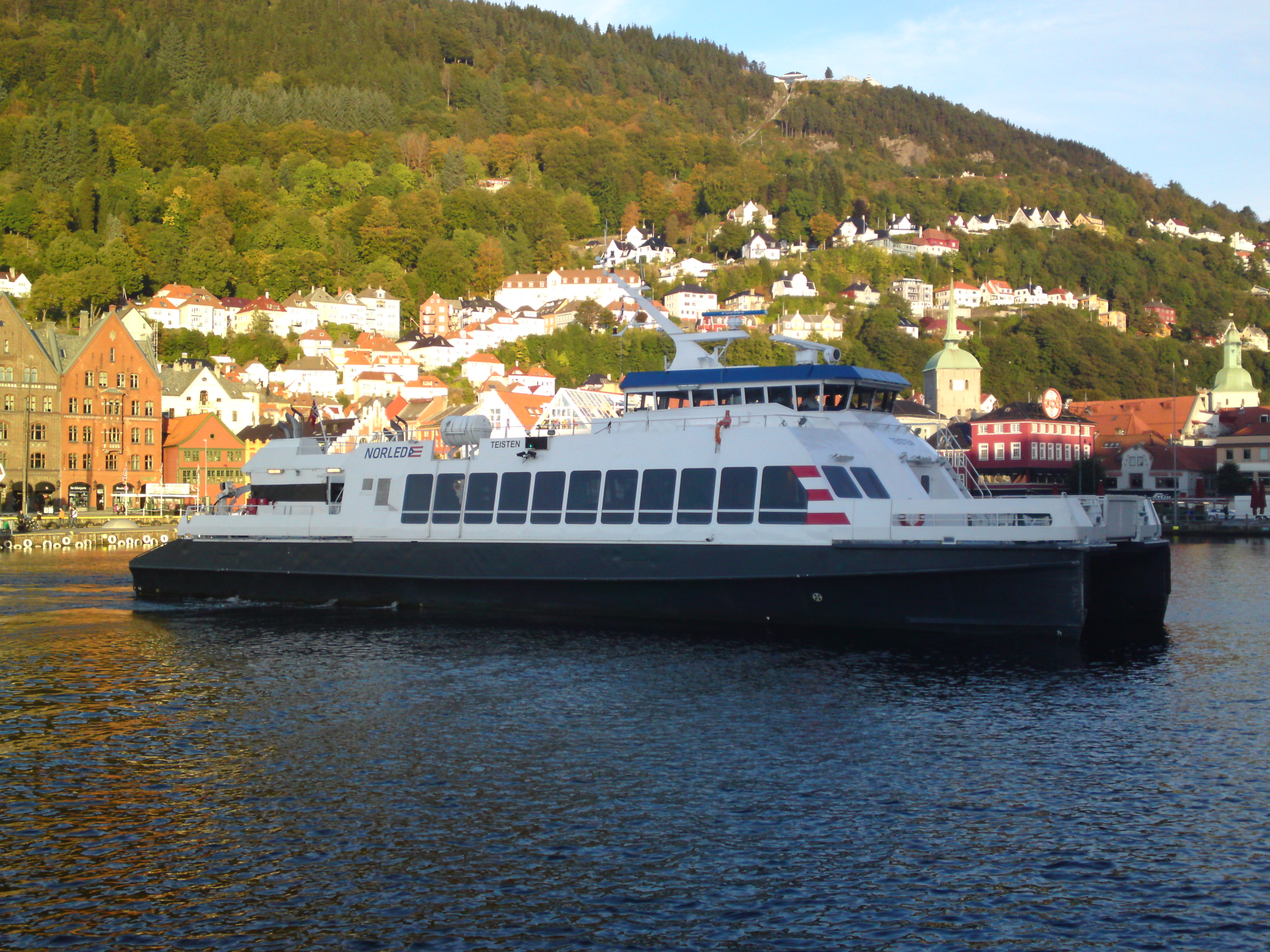 Teisten i Bergen.